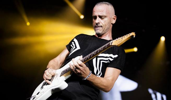 gira por europa perfetto